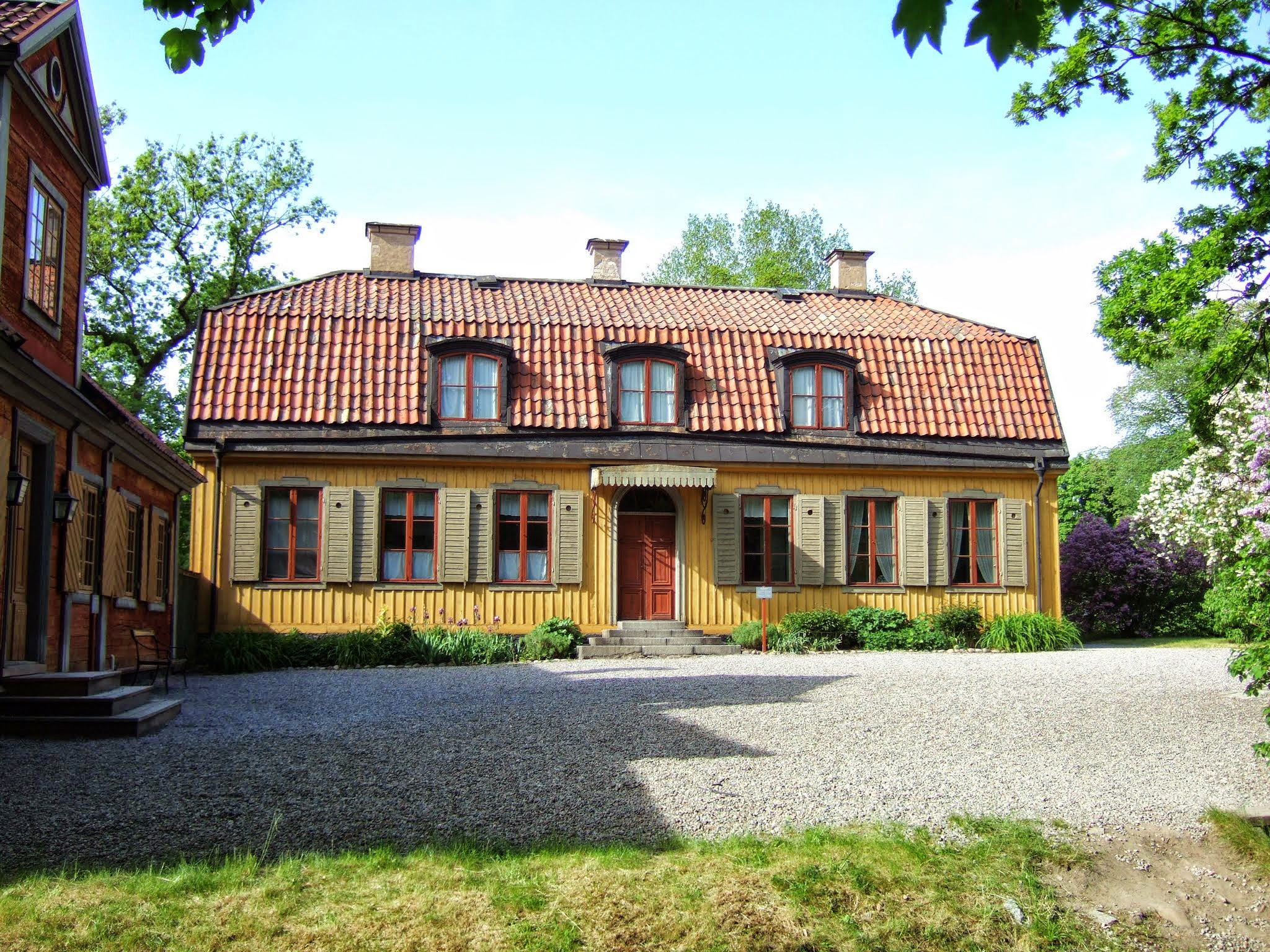 Djurgården, Östermalm, Stockholm, Sweden. Hazeliushuset med Jakobsbergs malmgård t.v.